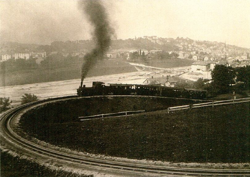 Die Appenzeller Strassenbahn bezwingt die steile und enge Ruckhaldenkurve ob St. Gallen.